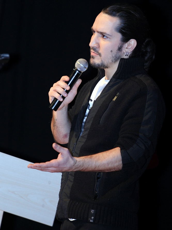 Doğukan Manço